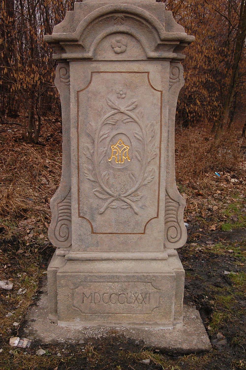 Doubrava (Karviná) podstavec kulturní památky sochy sv. Jana Nepomuckého.